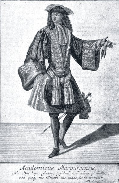 "Academicus Marpurgensis", Kupferstich von Philipp Jakob Leidenhoffer um 1700, Darstellung eines nach der neuesten französischen Mode kavaliersmäßig gekleideten Marburger Studenten, Rechte abgelaufen, Public Domain